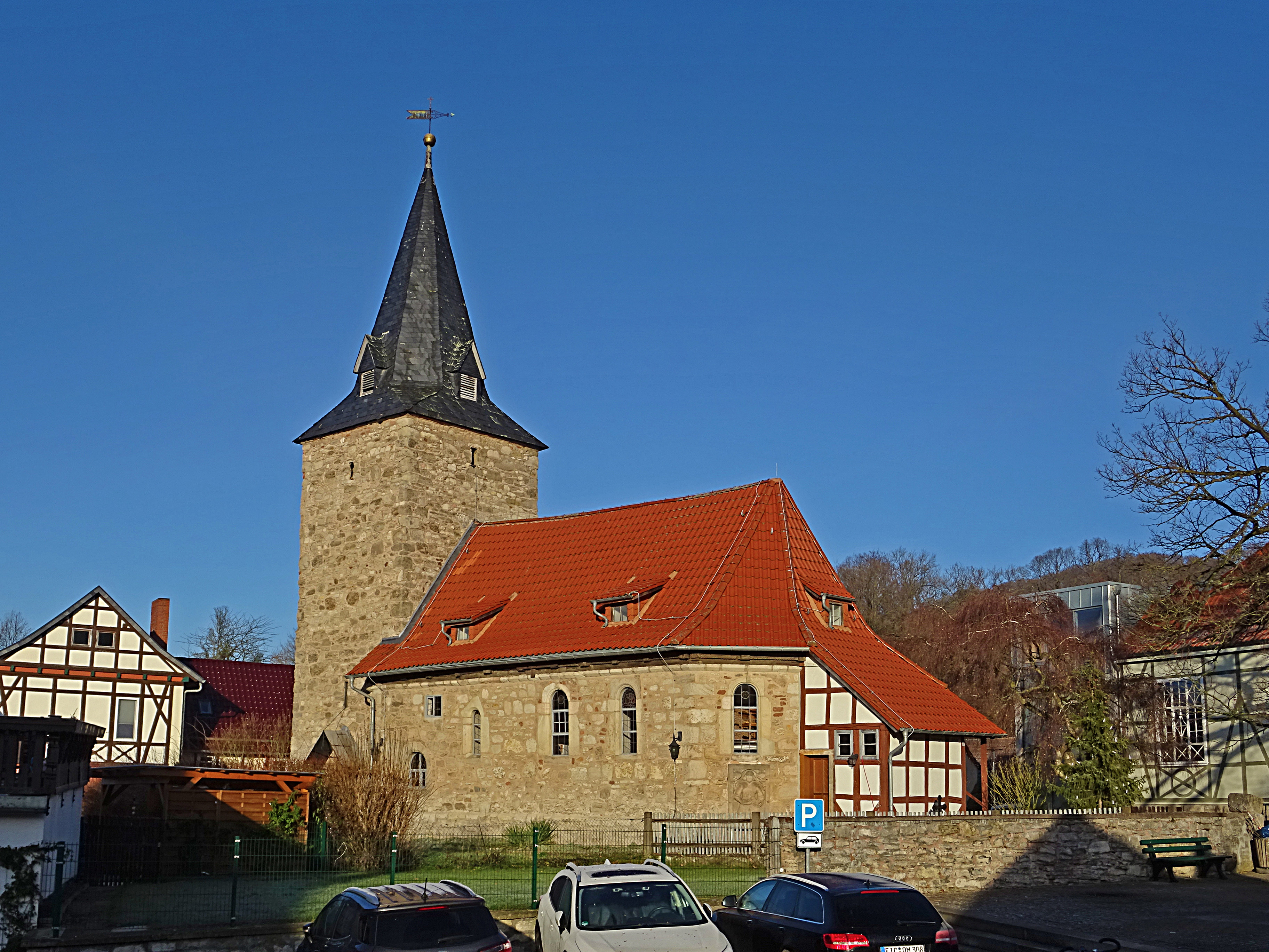 Wehrkirche St. Katharina (Wintzingerode) von Süden